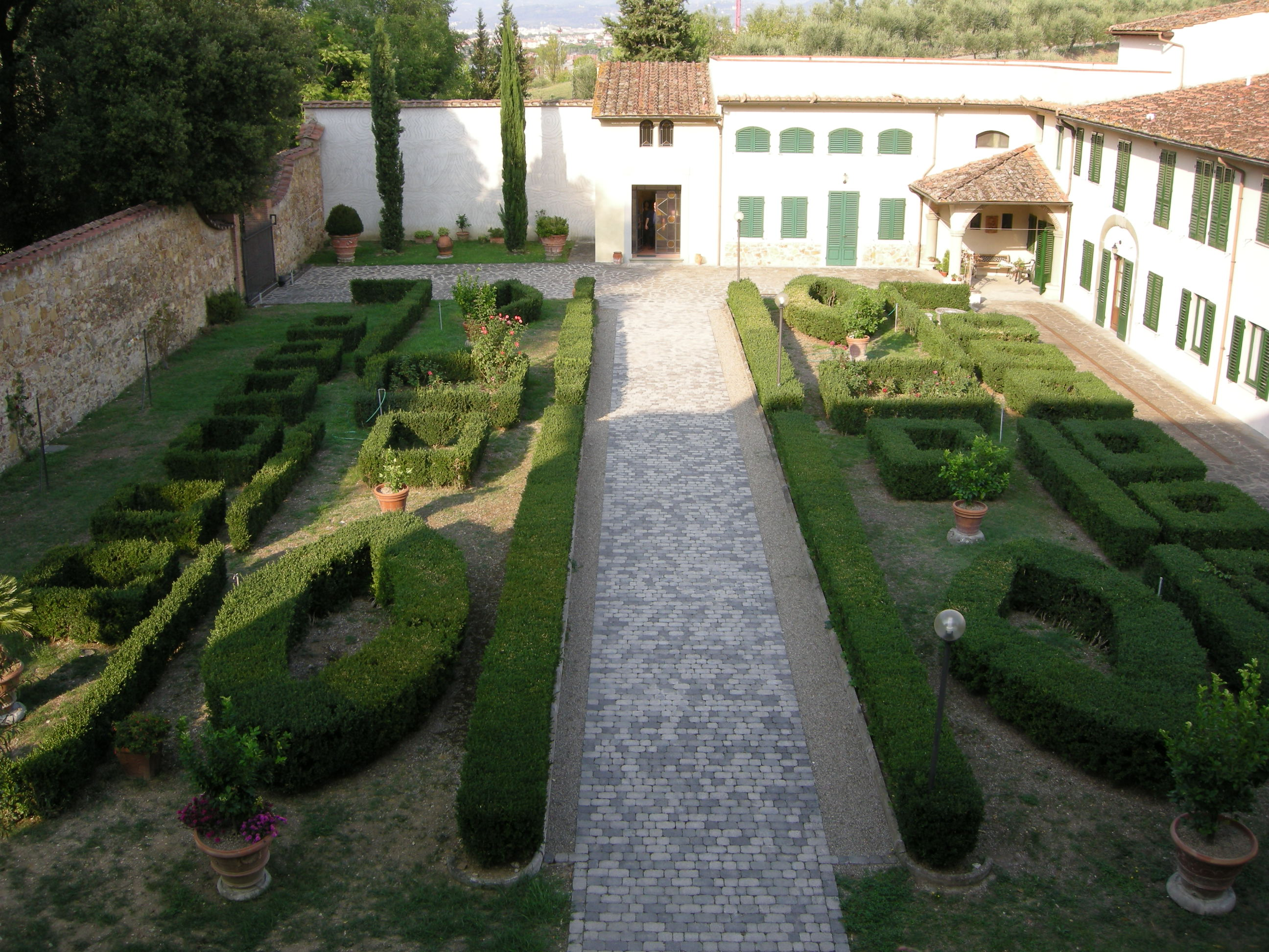 Villa La Nerlaia, giardino all'italiana